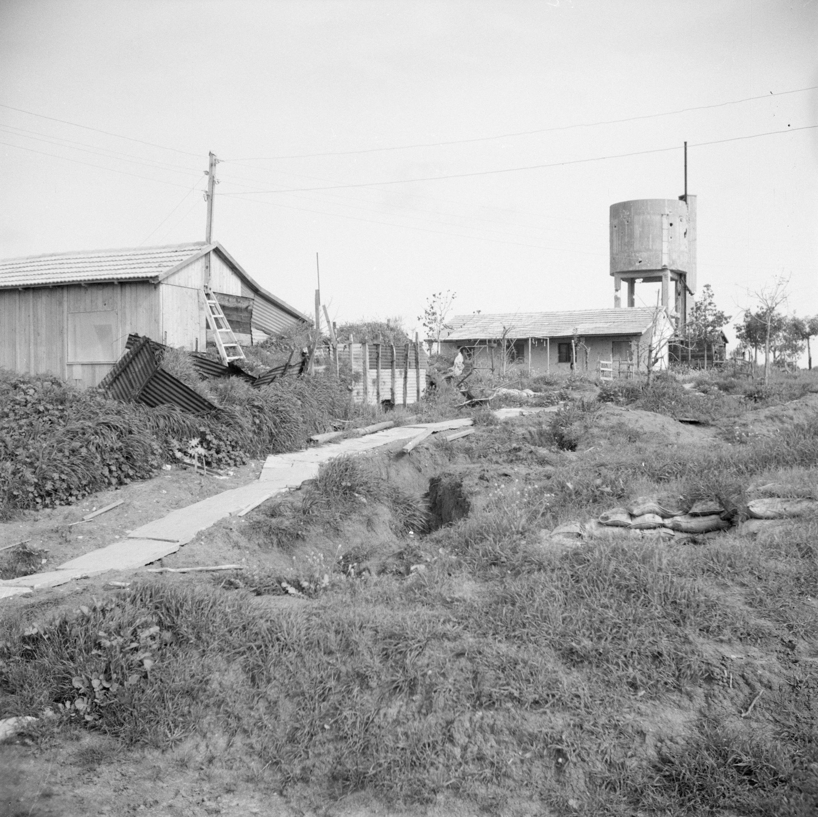 Collectie / Archief : Fotocollectie Van de Poll Reportage / Serie : Israël 1948-1949: kibboets Negbah Beschrijving : Gebouwen en de watertoren van kibboets Negbah die tijdens de Arabisch-Israëlische oorlog van 1948 beschadigd raakten Annotatie : Kibboets Negbah wordt ook wel aangeduid als Negba. Datering "begin 1949" Datum : 1 januari 1949 Locatie : Israël, Negev Trefwoorden : kibboetsen, oorlogsschade, torens, watervoorziening Fotograaf : Poll, Willem van de, [onbekend] Auteursrechthebbende : Nationaal Archief Materiaalsoort : Negatief (zwart/wit) Nummer archiefinventaris : bekijk toegang 2.24.14.02 Bestanddeelnummer : 255-0741